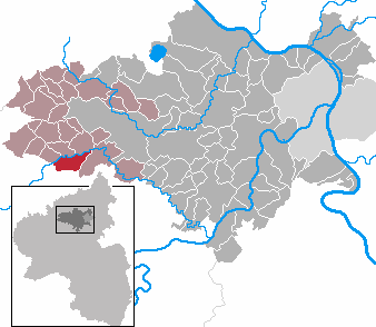 Bermel in Rhineland-Palatinate - district Mayen-Koblenz